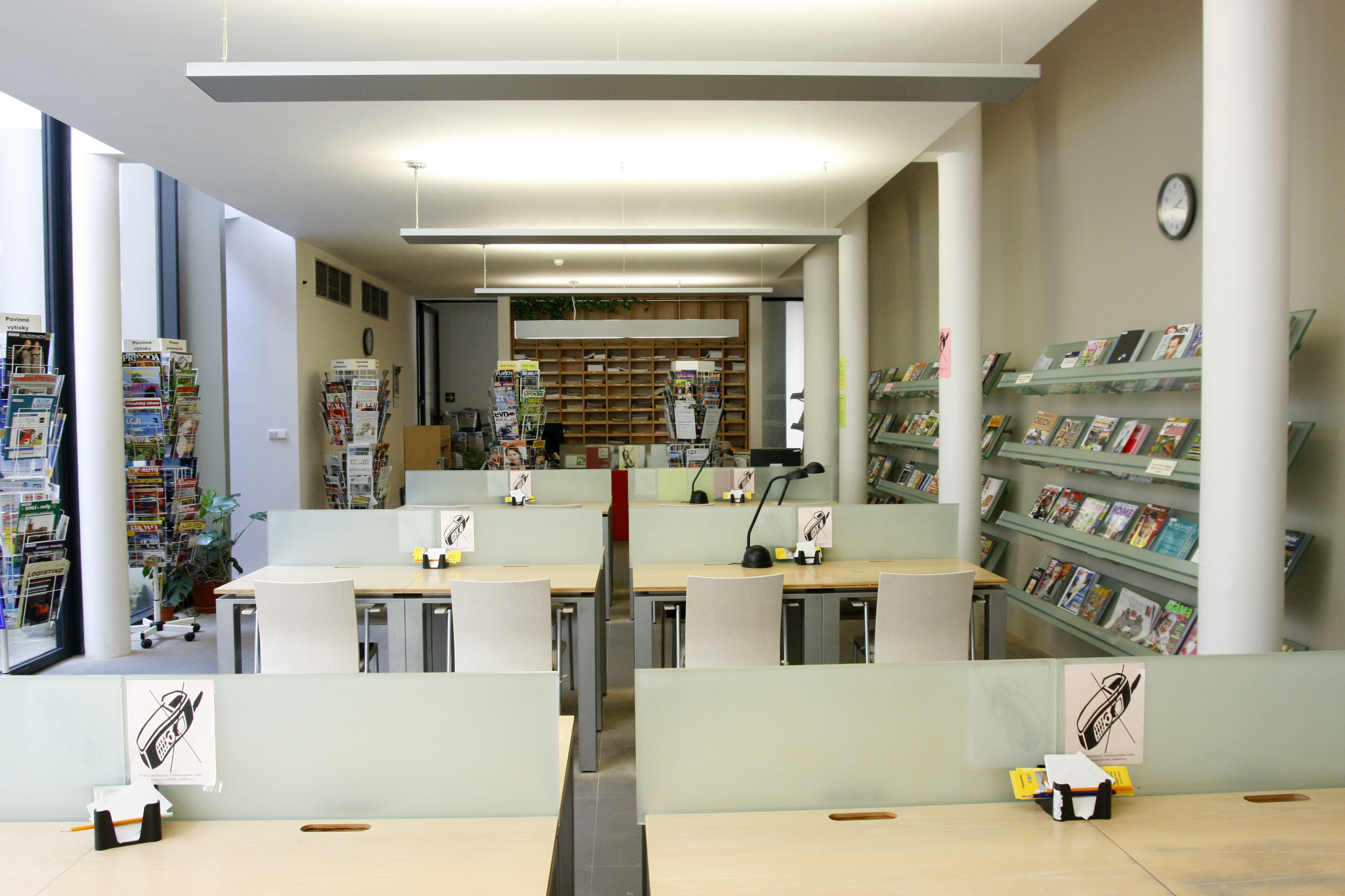 čítárna Krajské knihovny v Pardubicích, 2012